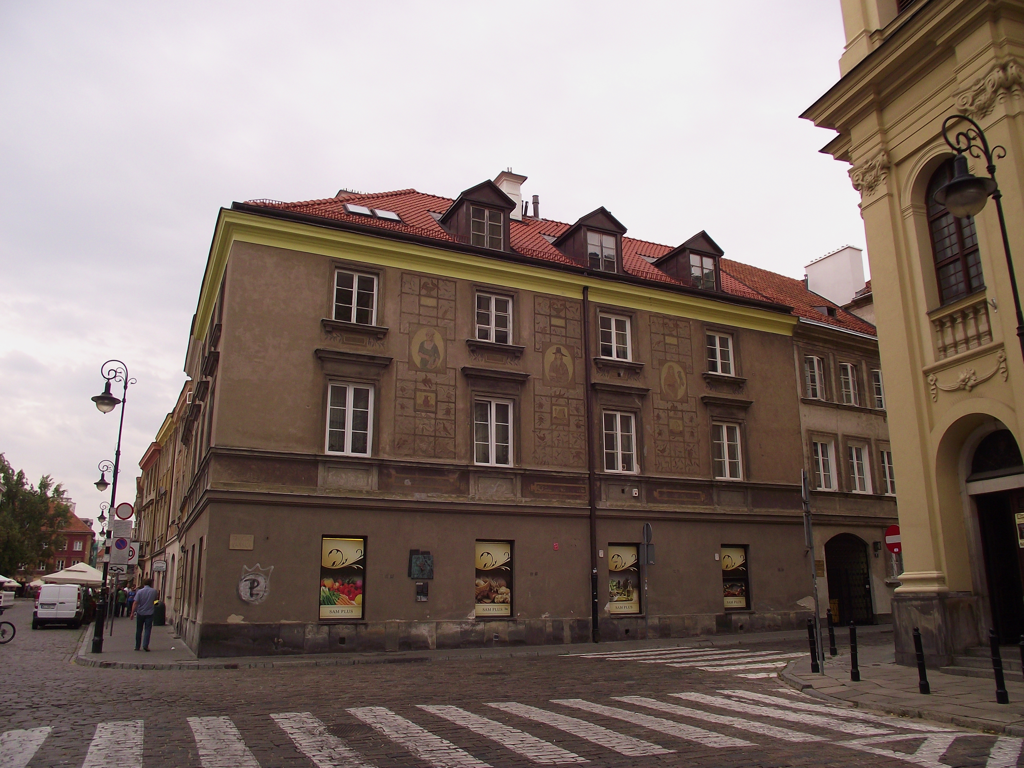 Kamienica z XVIII wieku przy ulicy Freta 53/55 w Warszawie, zniszczona i odbudowana po II wojnie światowej. Widok od strony ulicy Zakroczymskiej.